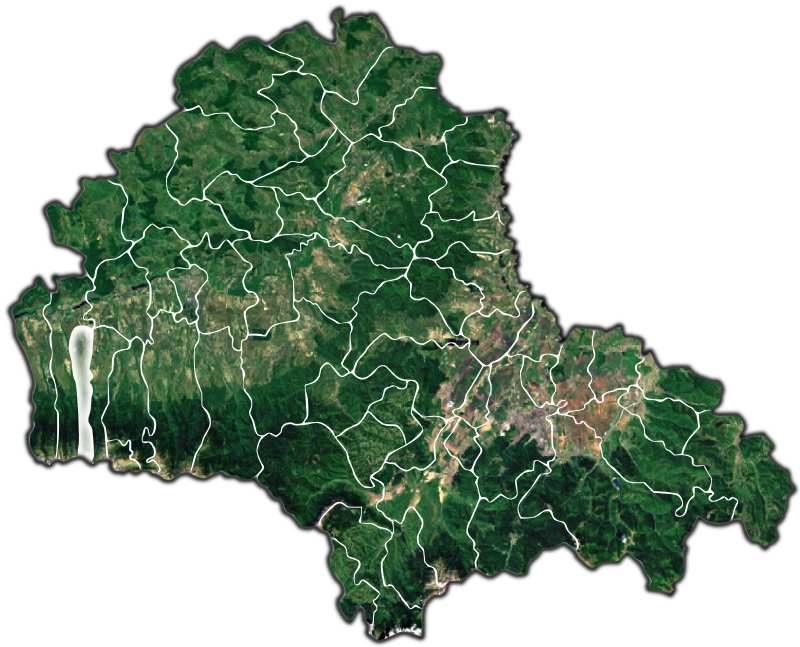 Dragus jud Brasov